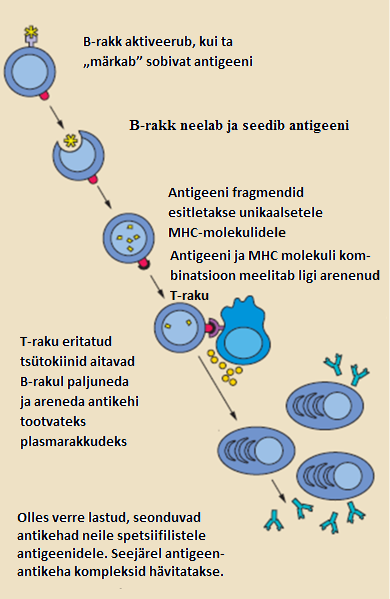 B-lümfotsüütide aktivatsiooni toimumise mehhanism